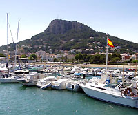 L'estartit